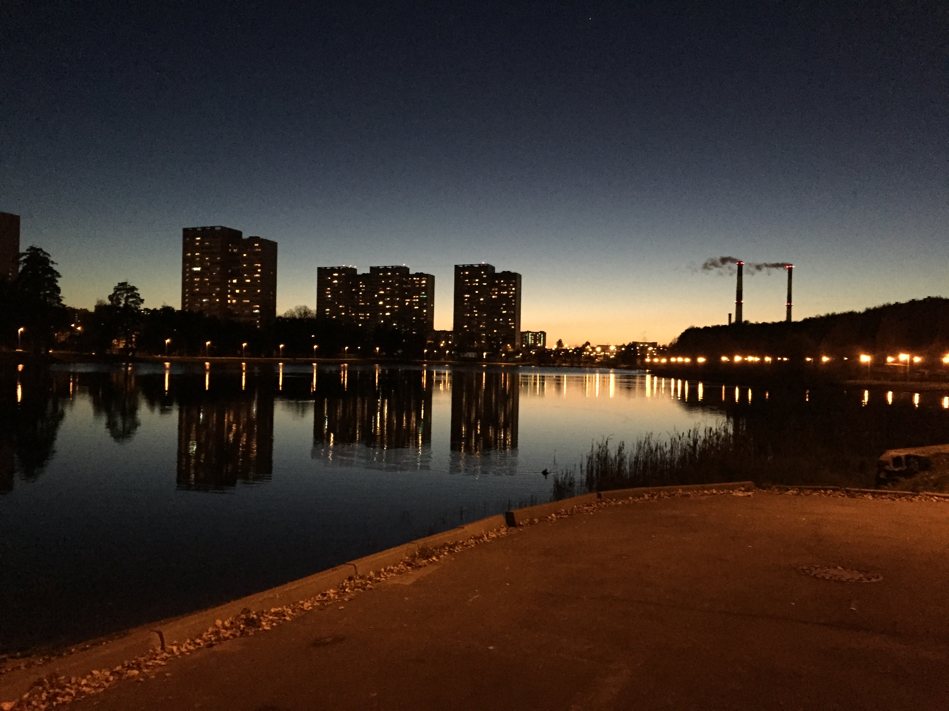 Вид на 10 мкр. Зеленограда со стороны Школьного озера